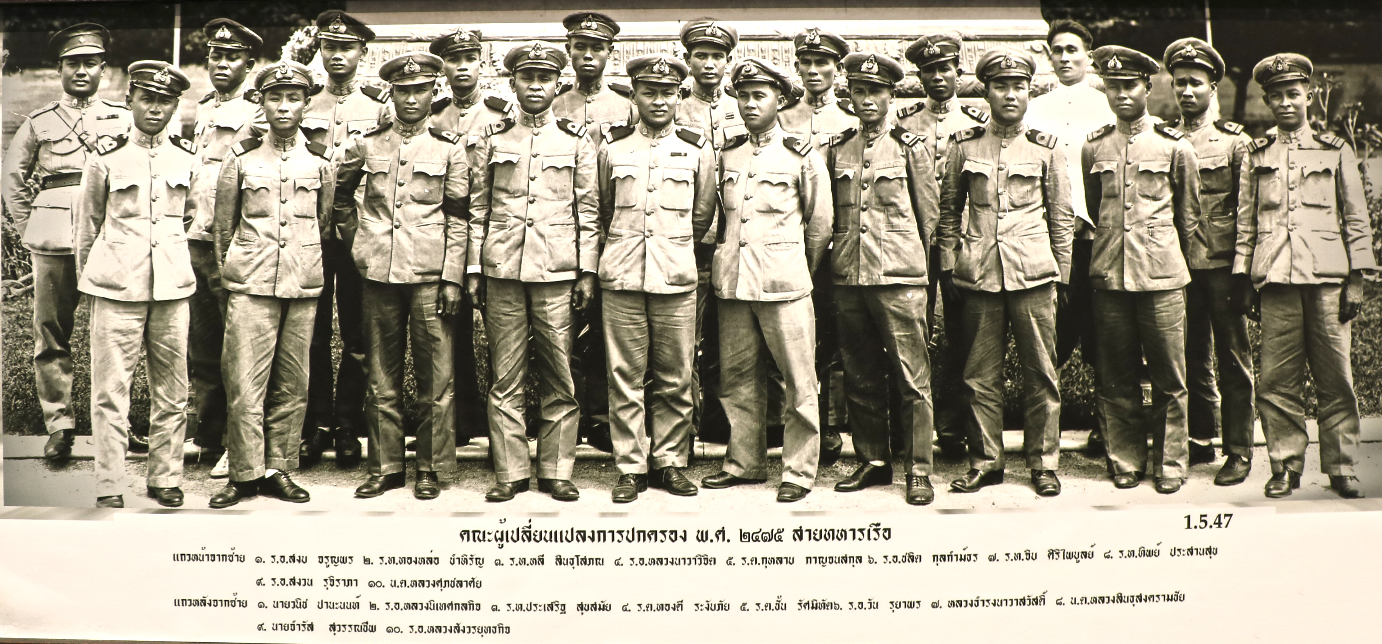 คณะราษฎรสายทหารเรือ